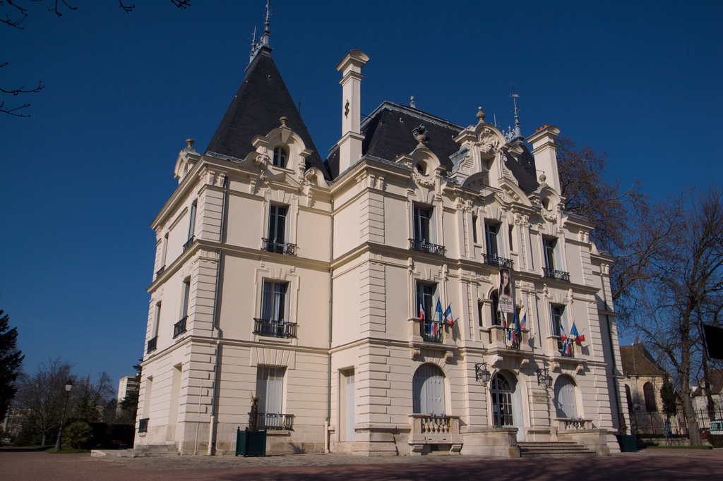 Hôtel de ville de Chilly-Mazarin, Essonne, France